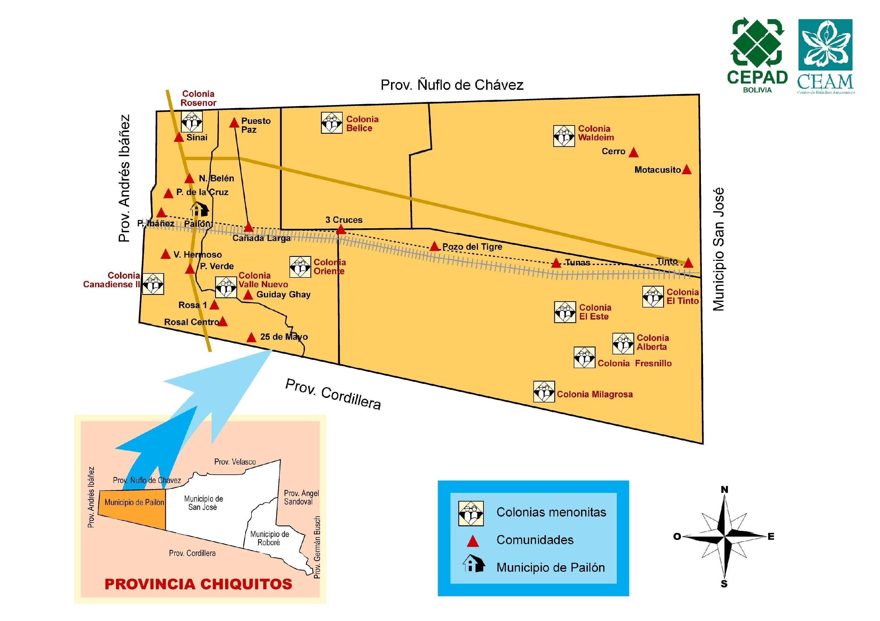 Mapa Municpio de Pailón